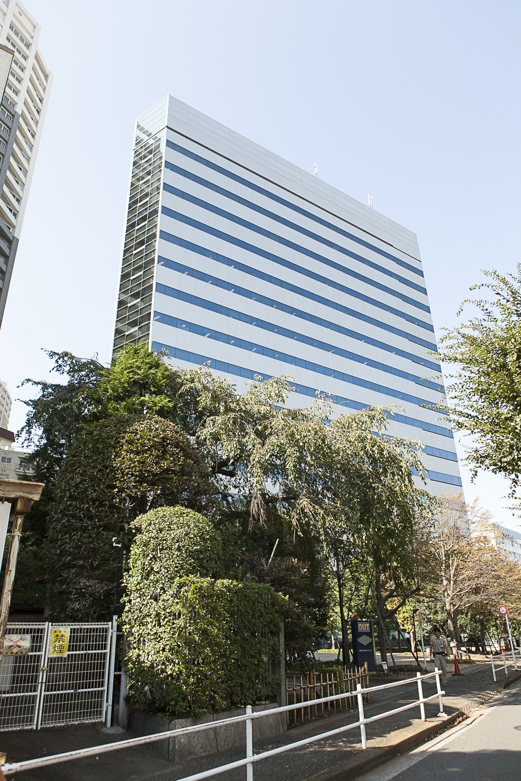 株式会社セラク本社のあるビルです